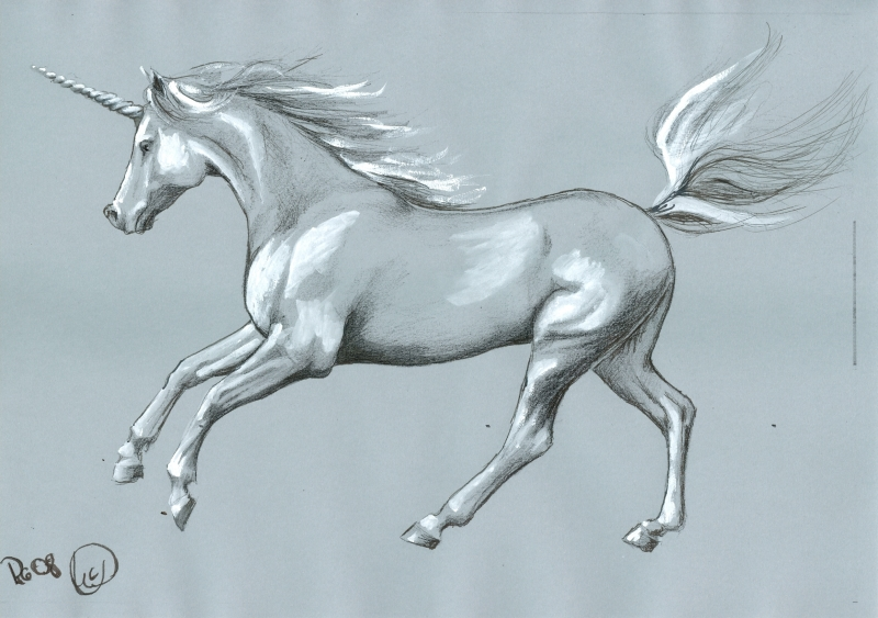 Tusche auf grau getöntem Papier, Höhung mit Deckweiß.